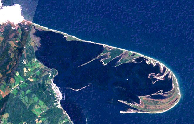 Notsuke Peninsula, Hokkaido, Japan.